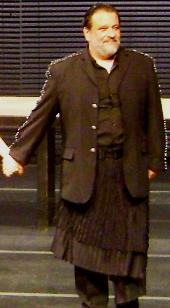 Luís Melo, ator brasileiro, ao final da peça "RockAntygona", em São Paulo.